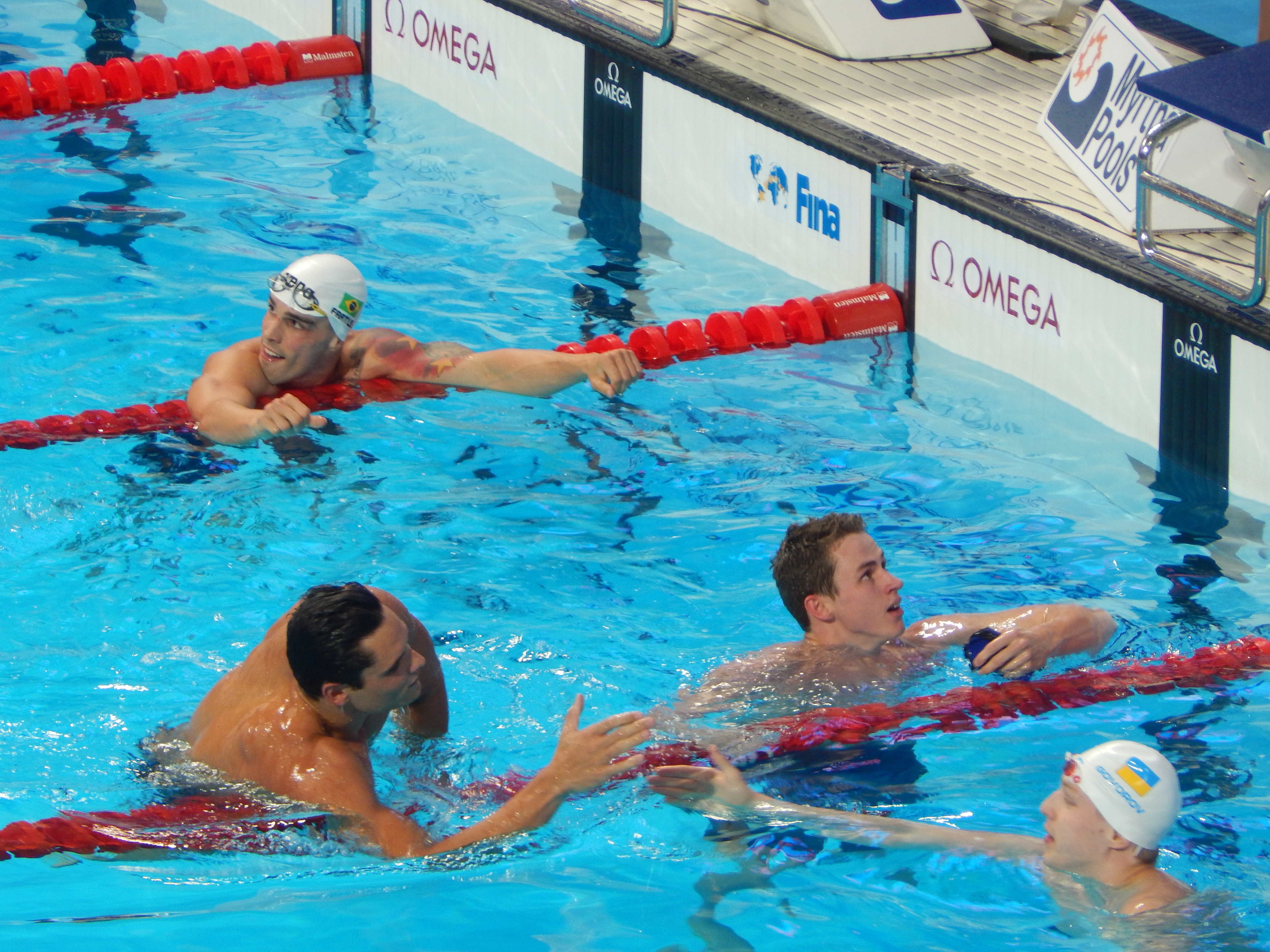 После финиша на 50 метров в/с в Казани на чемпионате мира